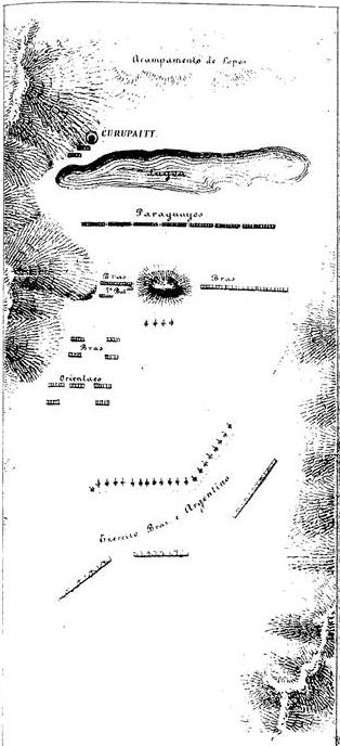 Planta das posições das forças belligerantes no dia 2 de Maio no Estero Bellaco